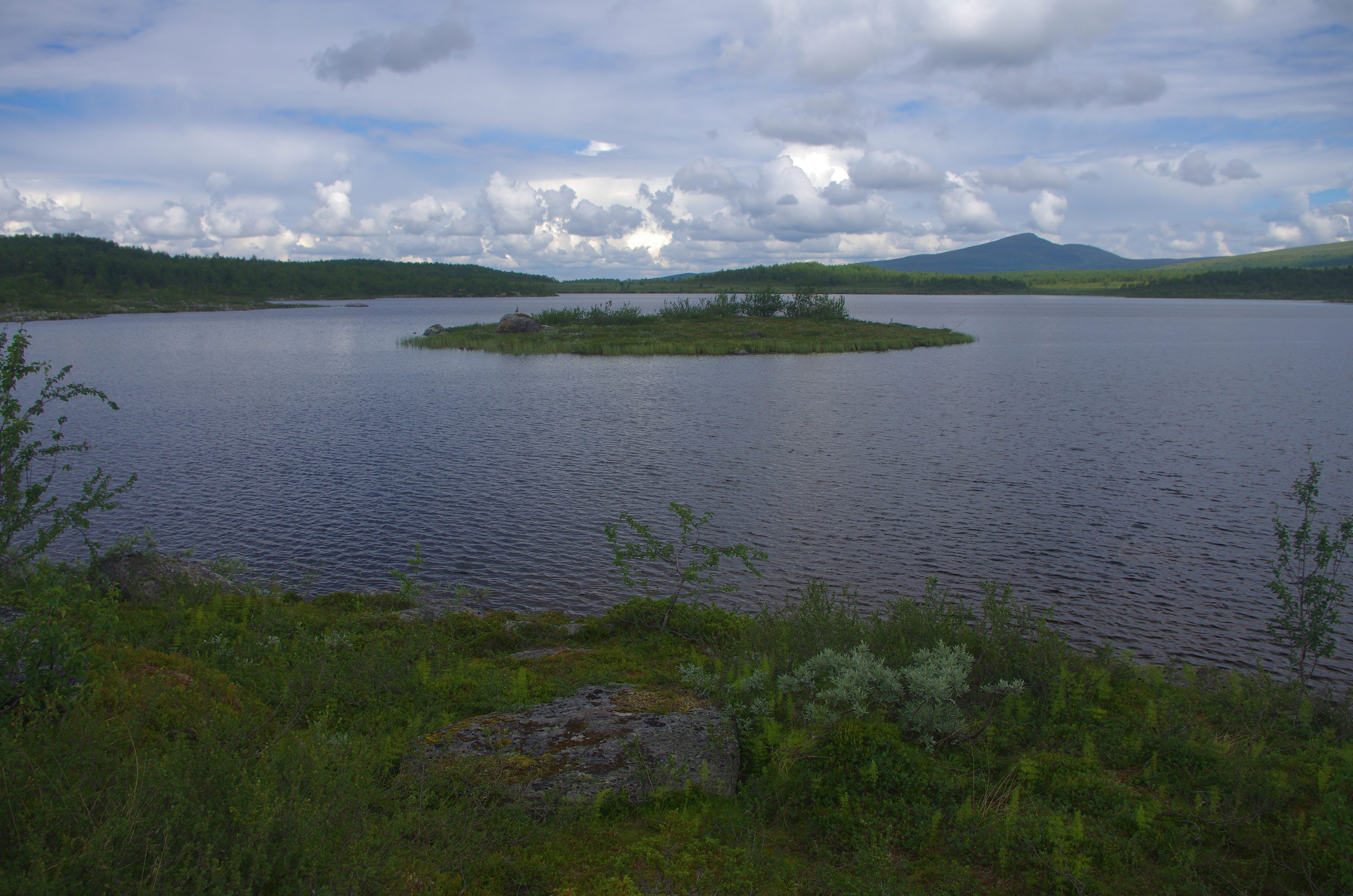 Sturmjaure (Stårbmiejávrrie) en sjö i Arjeplogs kommun i Lappland i Sverige.